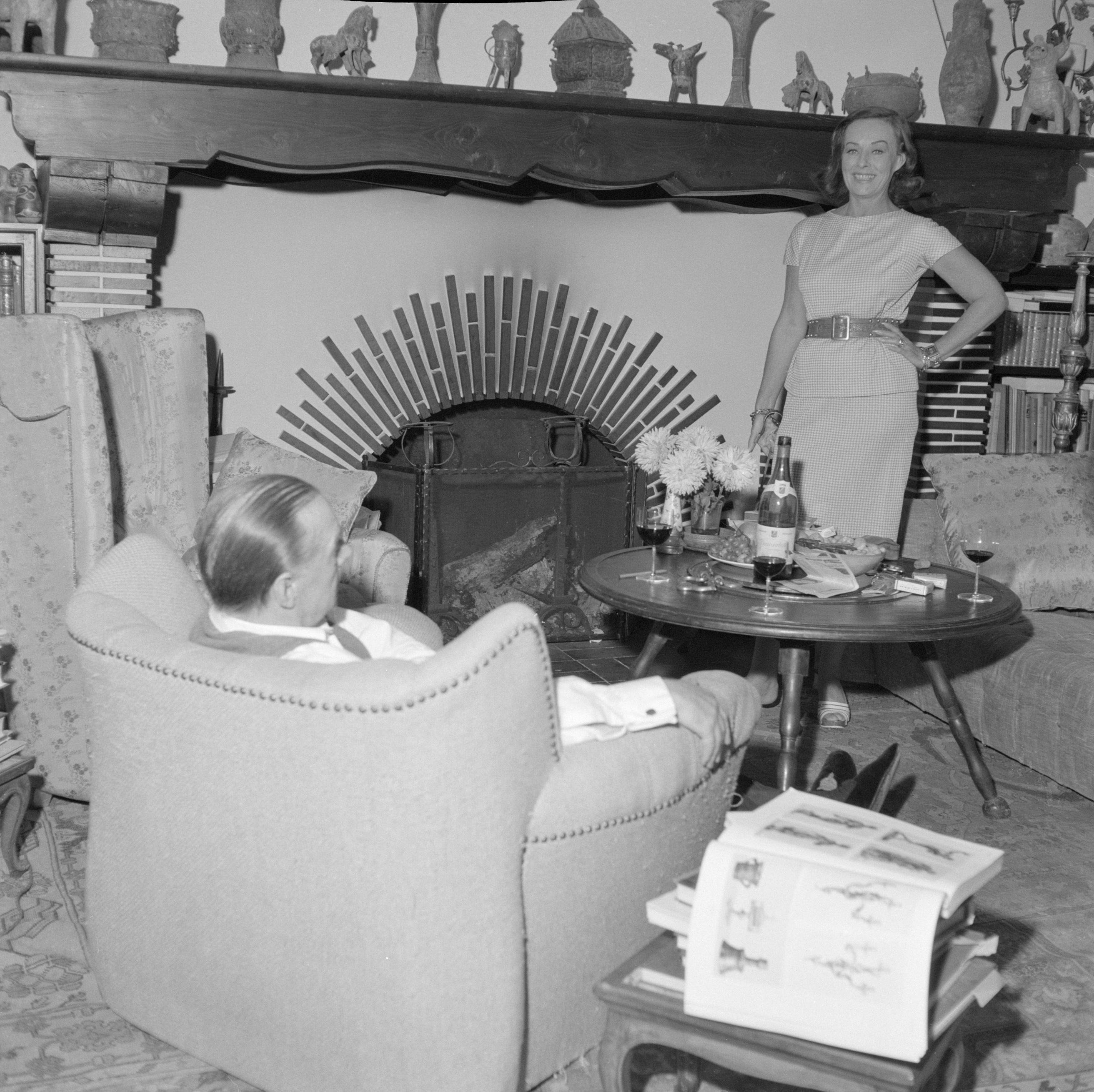 Collectie / Archief : Fotocollectie Van de Poll Reportage / Serie : Bezoek aan de Duitse auteur Erich Maria Remarque en de Amerikaanse actrice Paulette Goddard in hun villa in het Zwitserse Porto Ronco Beschrijving : Het echtpaar in hun woonkamer in de villa in Porto Ronco. Erich Maria Remarque zit in een armstoel, zijn vrouw Paulette Goddard maakt vuur in de open haard Datum : oktober 1961 Locatie : Lago Maggiore, Zwitserland Trefwoorden : acteurs, interieurs, schrijvers, woningen Persoonsnaam : Goddard, Paulette, Remarque, Erich Maria Fotograaf : Poll, Willem van de Auteursrechthebbende : Nationaal Archief Materiaalsoort : Negatief (6x6) Nummer archiefinventaris : bekijk toegang 2.24.14.02 Bestanddeelnummer : 254-4746